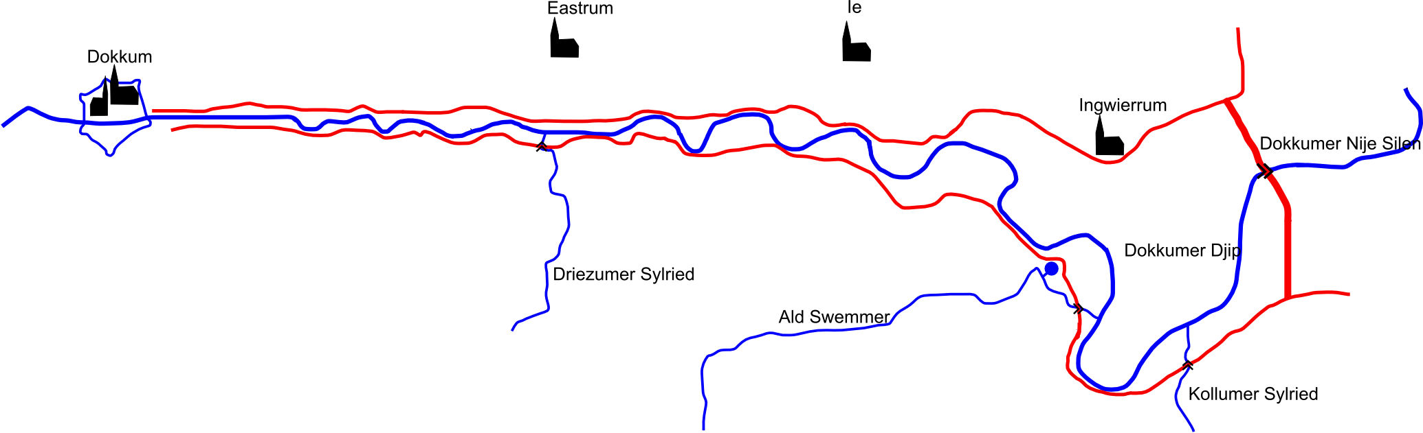 dokkumer djip in 1729